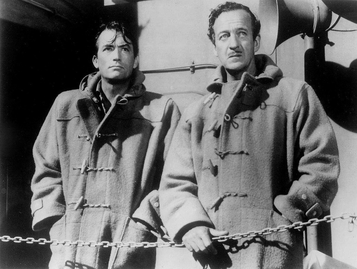 Publicity photo of Gregory Peck & David Niven taken for film The Guns of Navarone (1961). See also film still. No copyright notice.